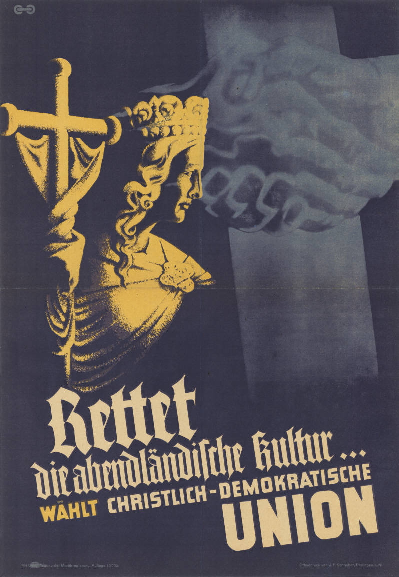 Rettet die abendländische Kultur ... Wählt Christlich-Demokratische Union Abbildung: Ecclesia (am Fürstenportal des Bamberger Doms) mit Fahne neben bläulichem Kreuz aus Händedruck (Grafik) Plakatart: Motiv-/Textplakat Künstler_Grafiker: Signet "Kettenglied" (?), vgl. 10-002-19 Auftraggeber: Mit Genehmigung der Militärregierung Drucker_Druckart_Druckort: Offsetdruck von J.F. Schreiber, Esslingen a.N., Auflage 13000 Objekt-Signatur: 10-002 : 20 Bestand: Landtagswahlplakate Baden-Württemberg (10-002) GliederungBestand10-18: Landtagswahlplakate Baden-Württemberg (10-002) » CDU Lizenz: KAS/ACDP 10-002 : 20 CC-BY-SA 3.0 DE